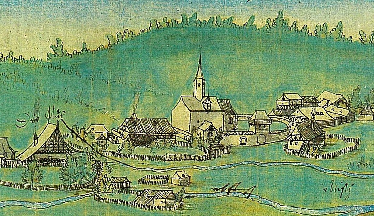 Darstellung des Ortskerns von Markersbach/Erzg. um 1535 (links Mühle, daneben Pfarrhaus und Kirche)